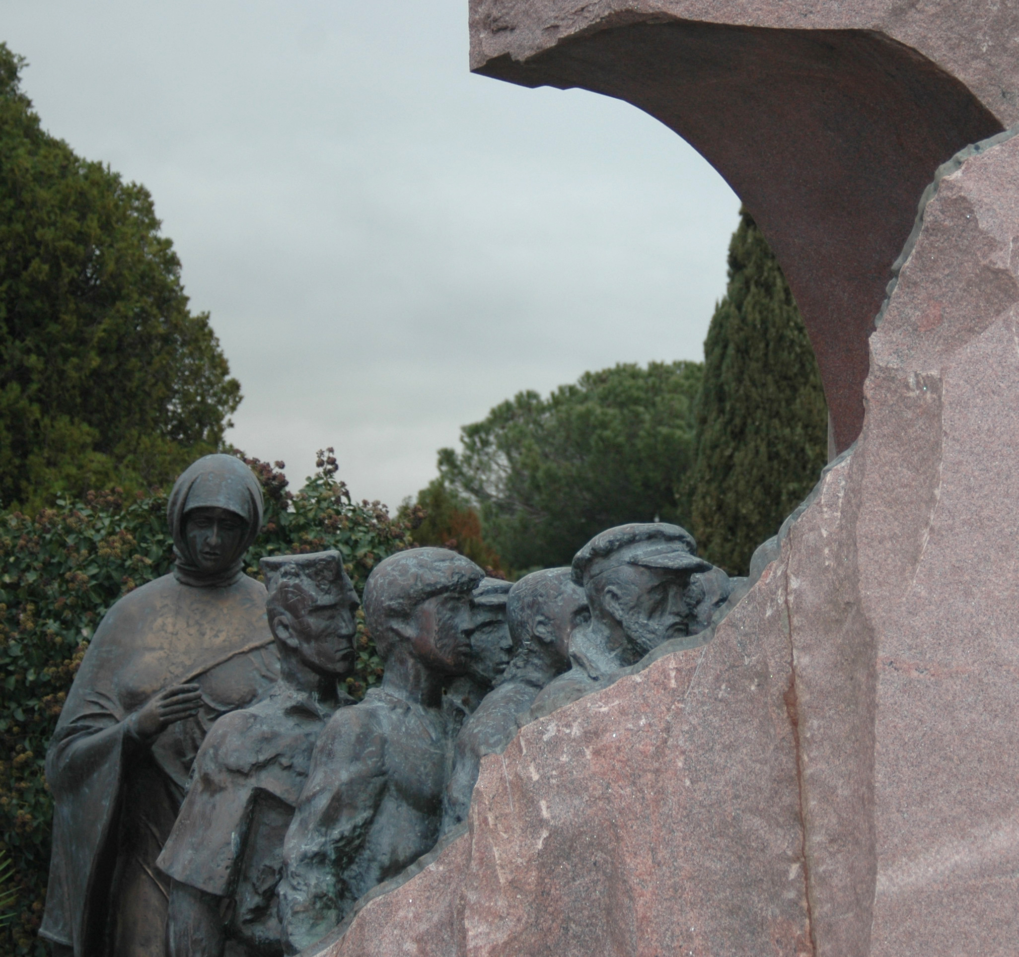 Imágenes de los combatientes voluntarios soviéticos. En el fondo a la izquierda, figura da la Madre Patria